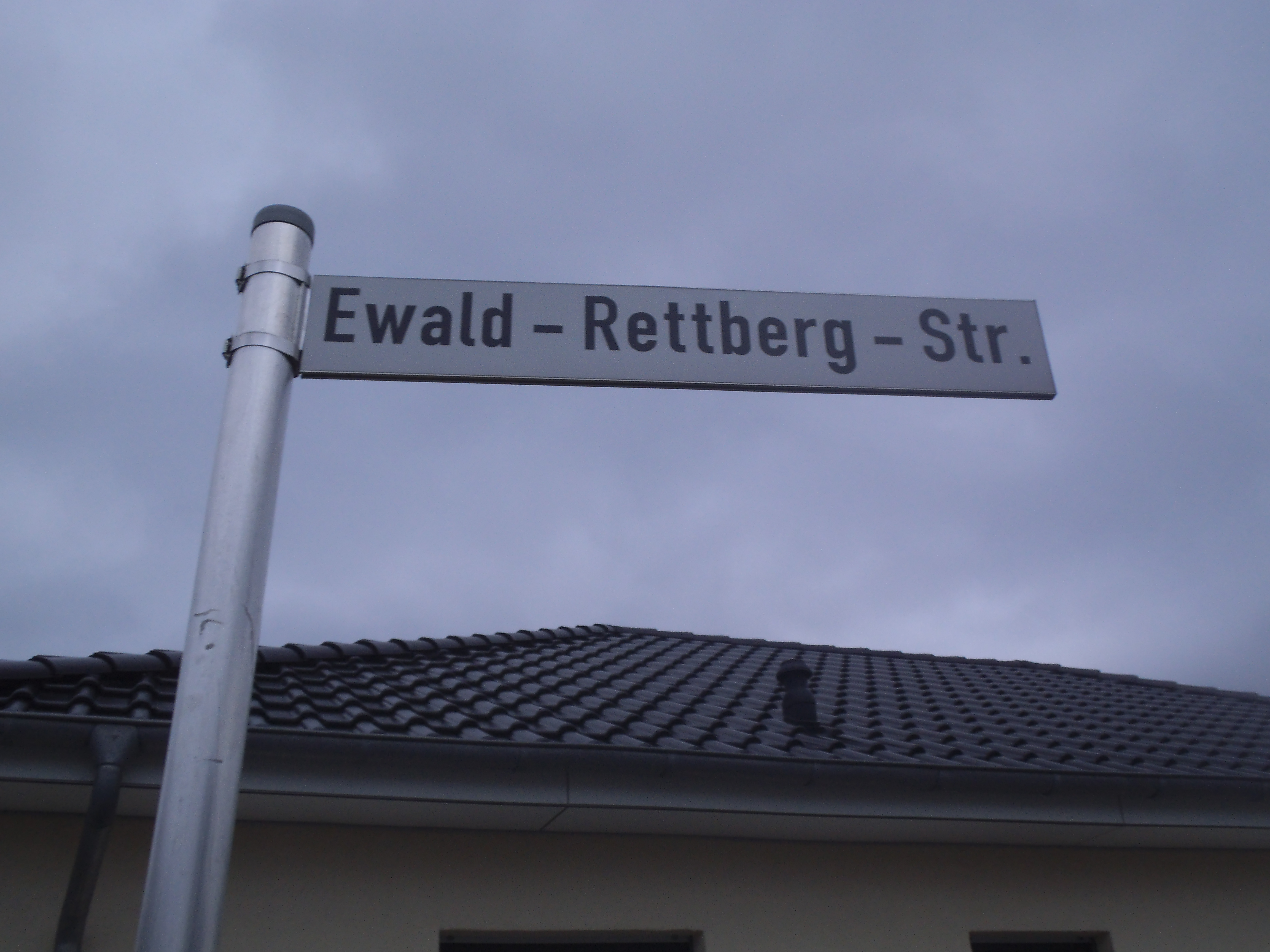 Straßenschild in einem Neubaugebiet am oberen Strückerberg in Ennepetal-Büttenberg. Die Straße ist nach einem ehemaligen Bürgermeister Ennepetals benannt.